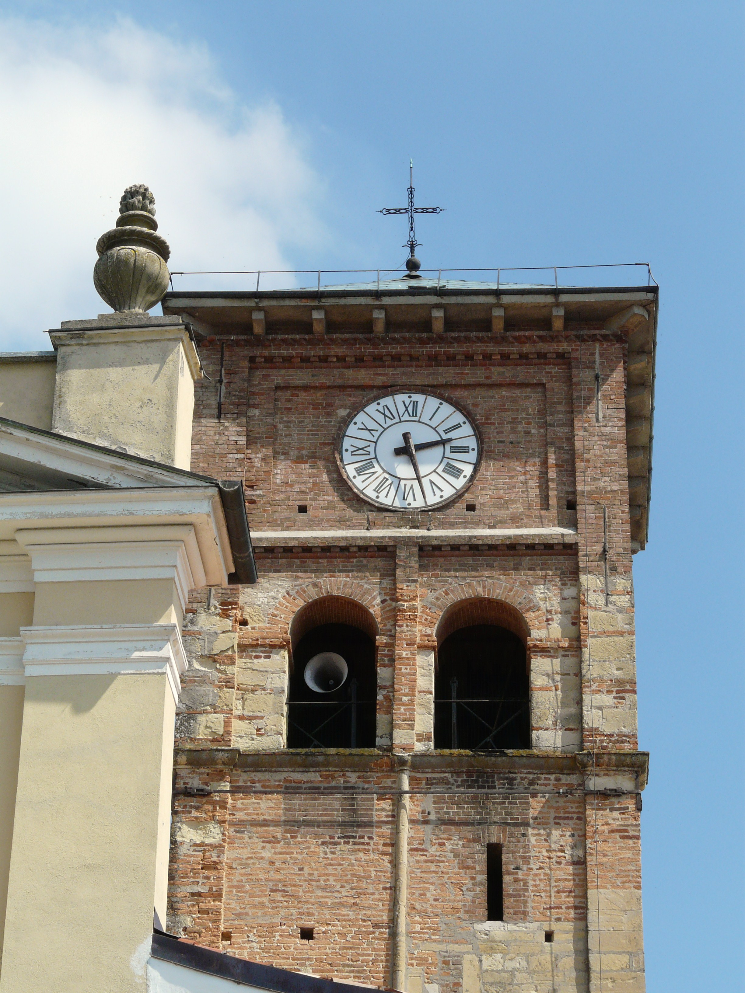 Chiesa dei Santi Vittore e Corona, già abbazia aleramica, di Grazzano Badoglio, Piemonte, Italia